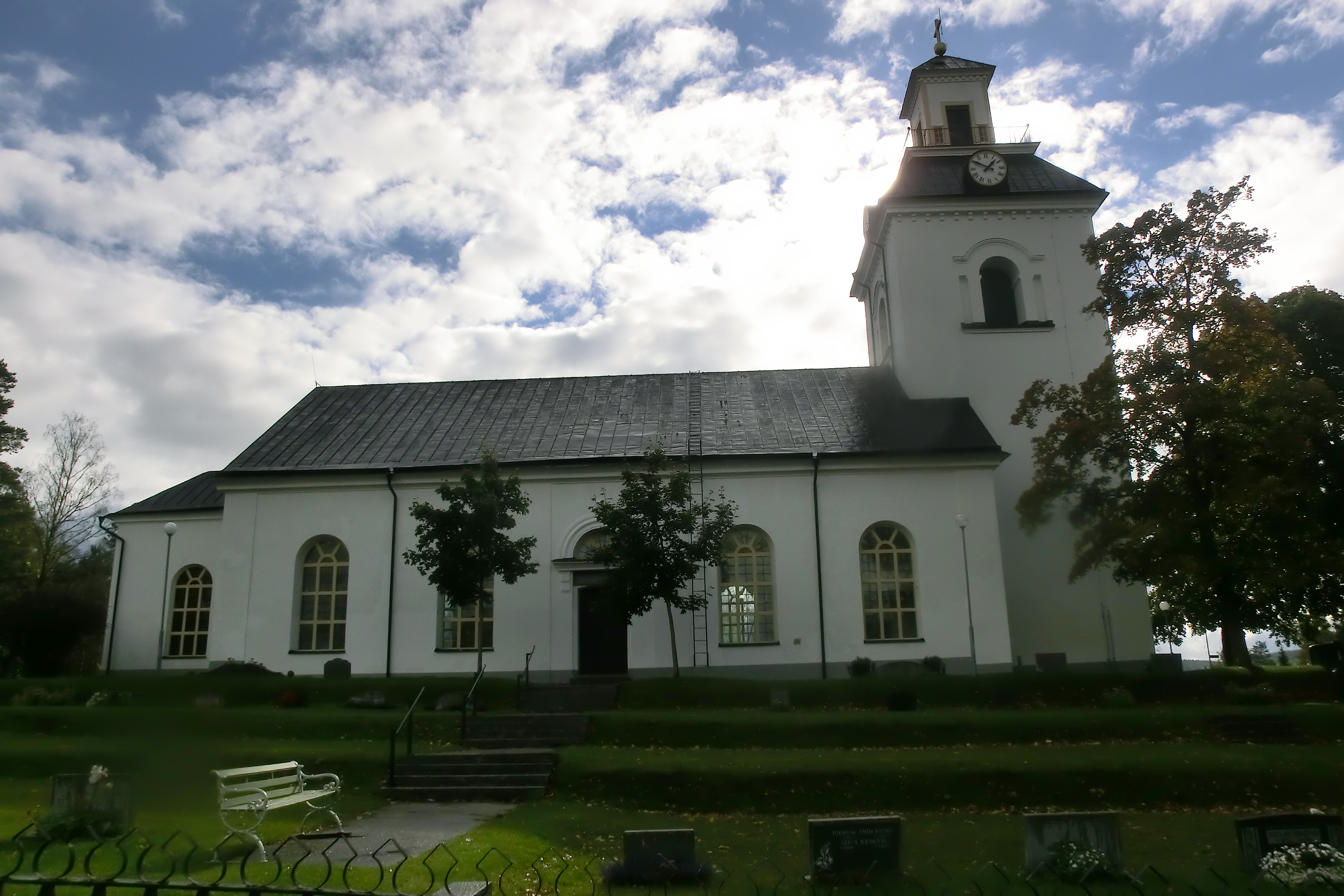 Ilsbo kyrka